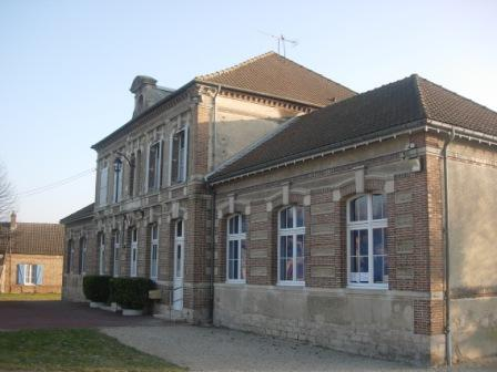 Gélannes